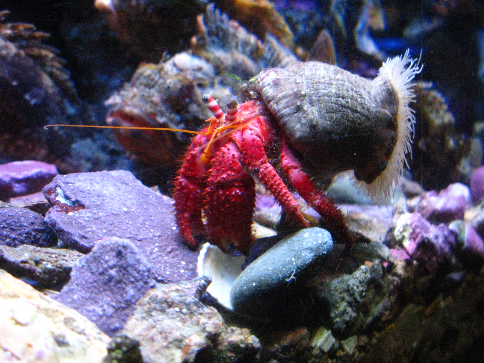 Bernard-l'ermite (pagurus bernhardus) rouge de grosse taille, au fond d'un aquarium, musée océanographique de Monaco.